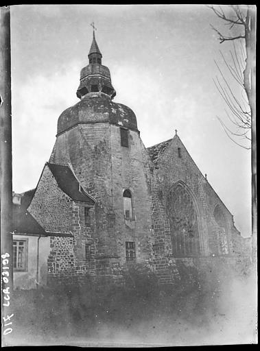 L'église Notre-Dame-des-Carmes à Pont-l'Abbé, photographiée par Paul Lancrenon.